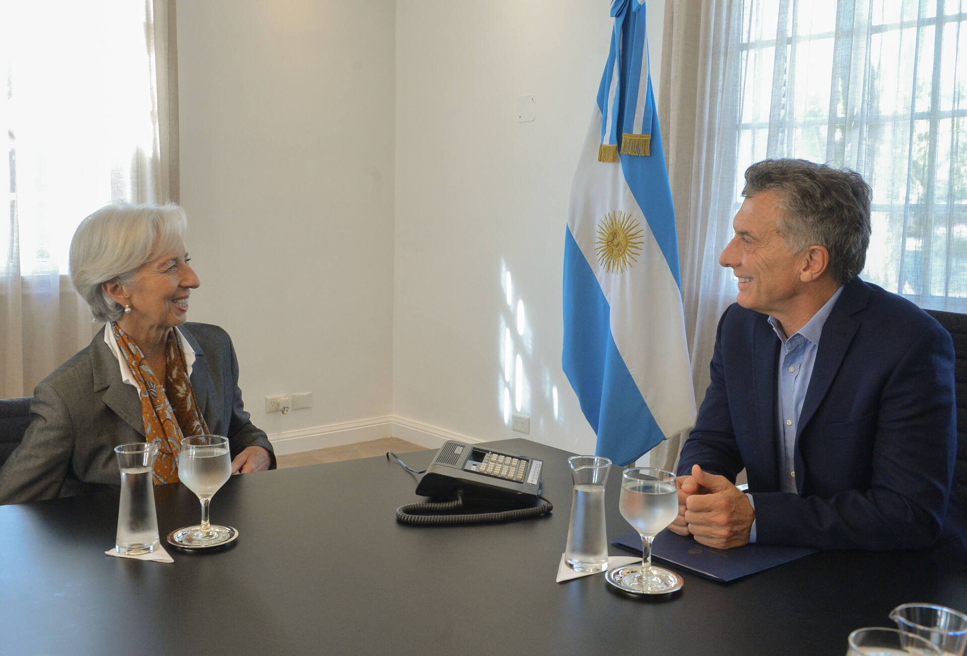 El presidente Mauricio Macri recibió en la residencia de Olivos a la directora del Fondo Monetario Internacional, Christine Lagarde. También participó de la audiencia el ministro de Hacienda, Nicolás Dujovne.